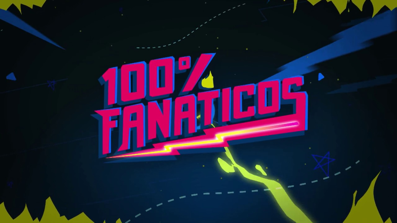 Logo de 100% Fanáticos Temporada I y II del 2019